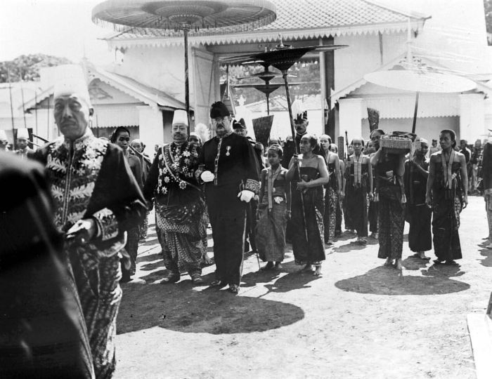 Repronegatief. De Soenan loopt aan de arm van de Resident tijdens een Islamitische optocht